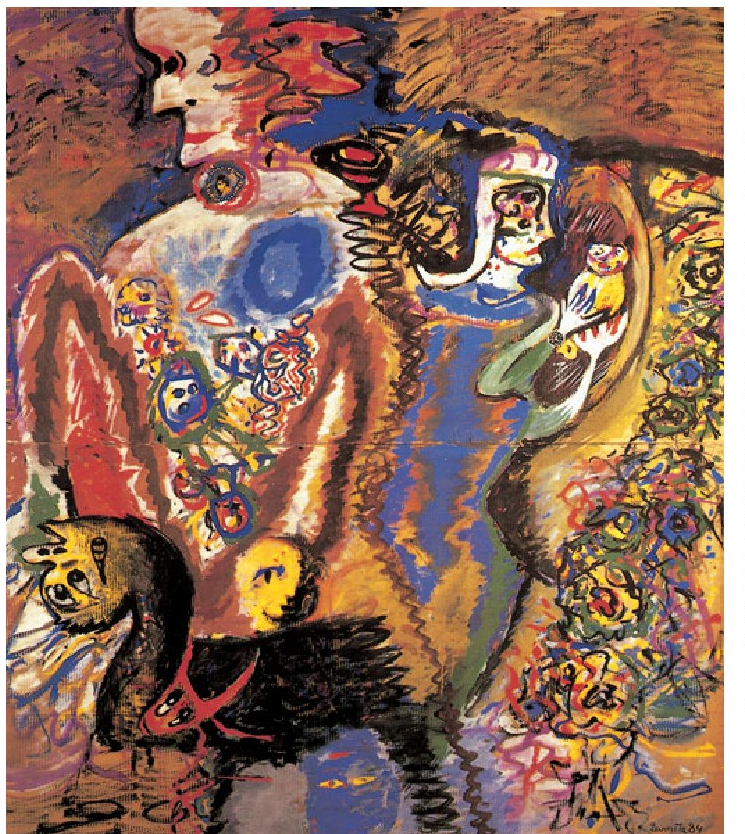 La egipcia se escapó con el pájaro (1984), Jose Luis Zumetarena, Papiroak sail bikainekoa, industria kartoi zimurraren gainean tenpera erabiliz egina.